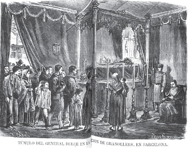 Tumulo del general Domingo Dulce y Garay, Capitán General de Cuba, en la estación de ferrocarril de Granollers, provincia de Barcelona, España, muerto el 23 de noviembre de 1869 en la localidad antaño catalana de Els Banys d'Arles i Palaldà.